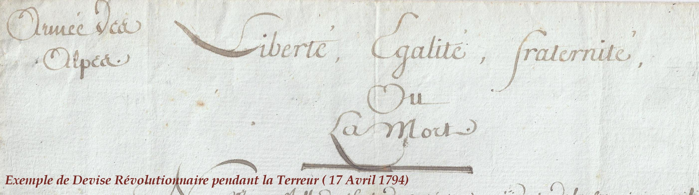 Exemple de Devise Révolutionnaire sous la Terreur